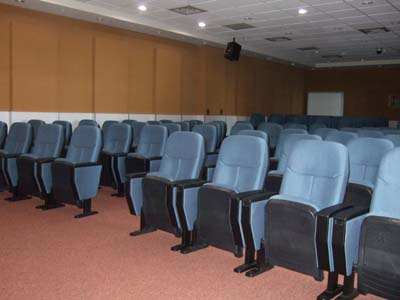 北台灣科技學院團體視聽室。